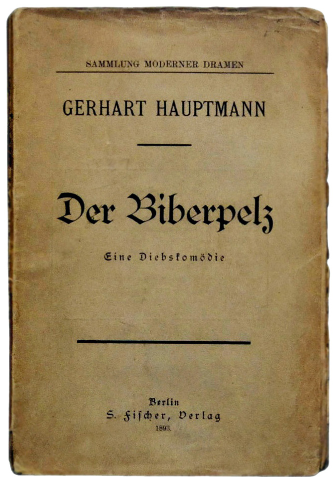 Gerhart Hauptmann Der Biberpelz. Erstdruck (kartoniert) von 1893.